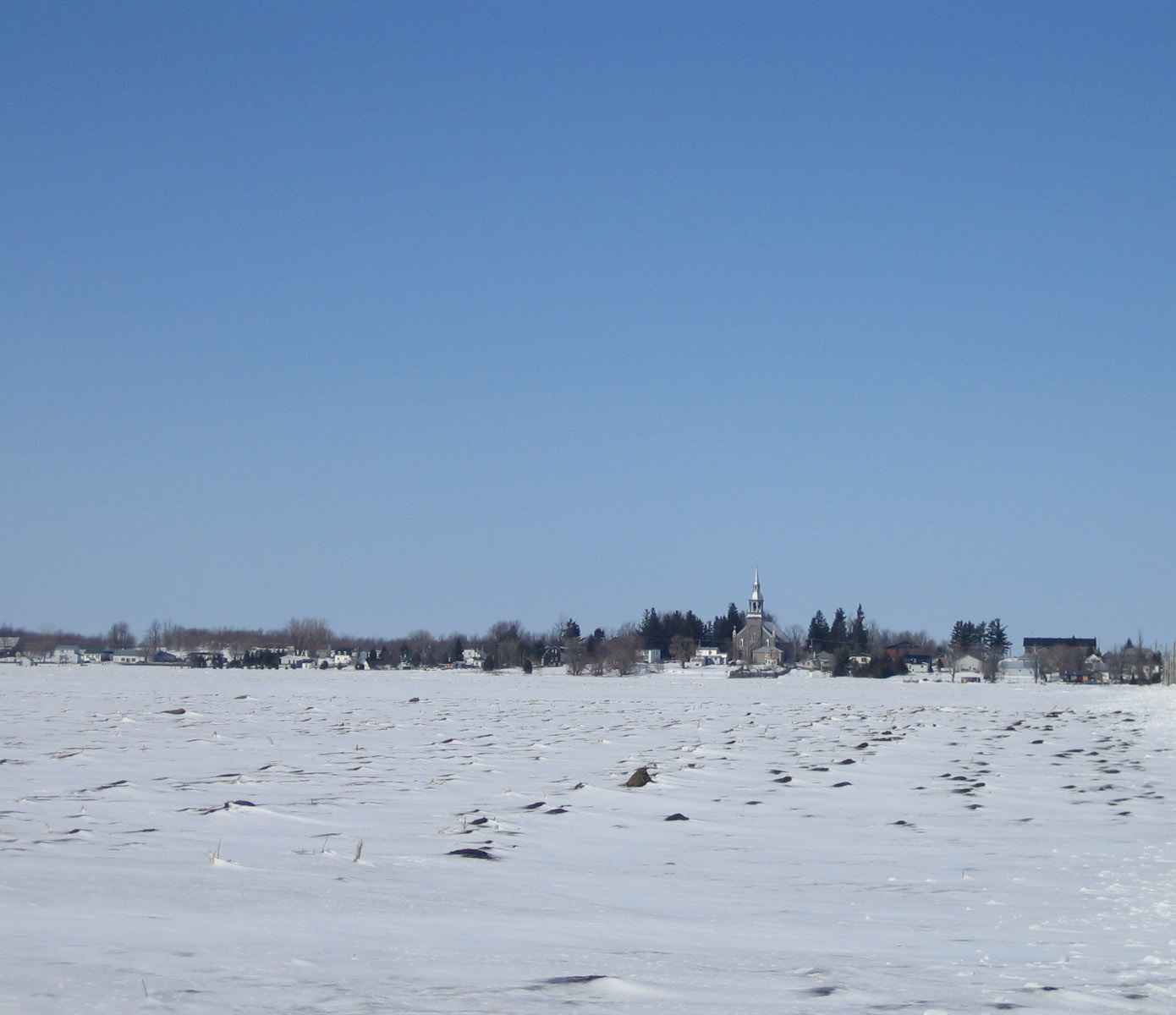 Saint-Télesphore (photo personnelle 2005) Utilisateur:FRED